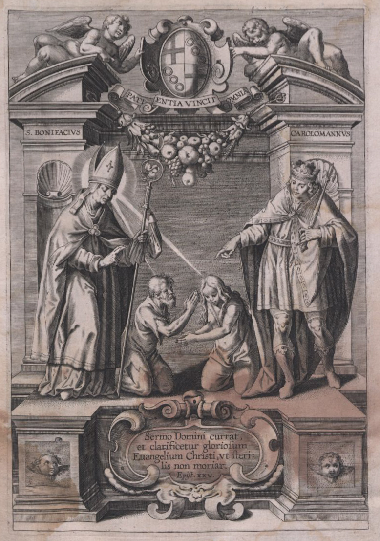 Titelkupfer aus: Fvldensivm Antiqvitatvm Libri IIII. von Christoph Brouwer, mit dem hl. Bonifatius und Karlmann, oben das Wappen des Fürstabts Johann Friedrich von Schwalbach